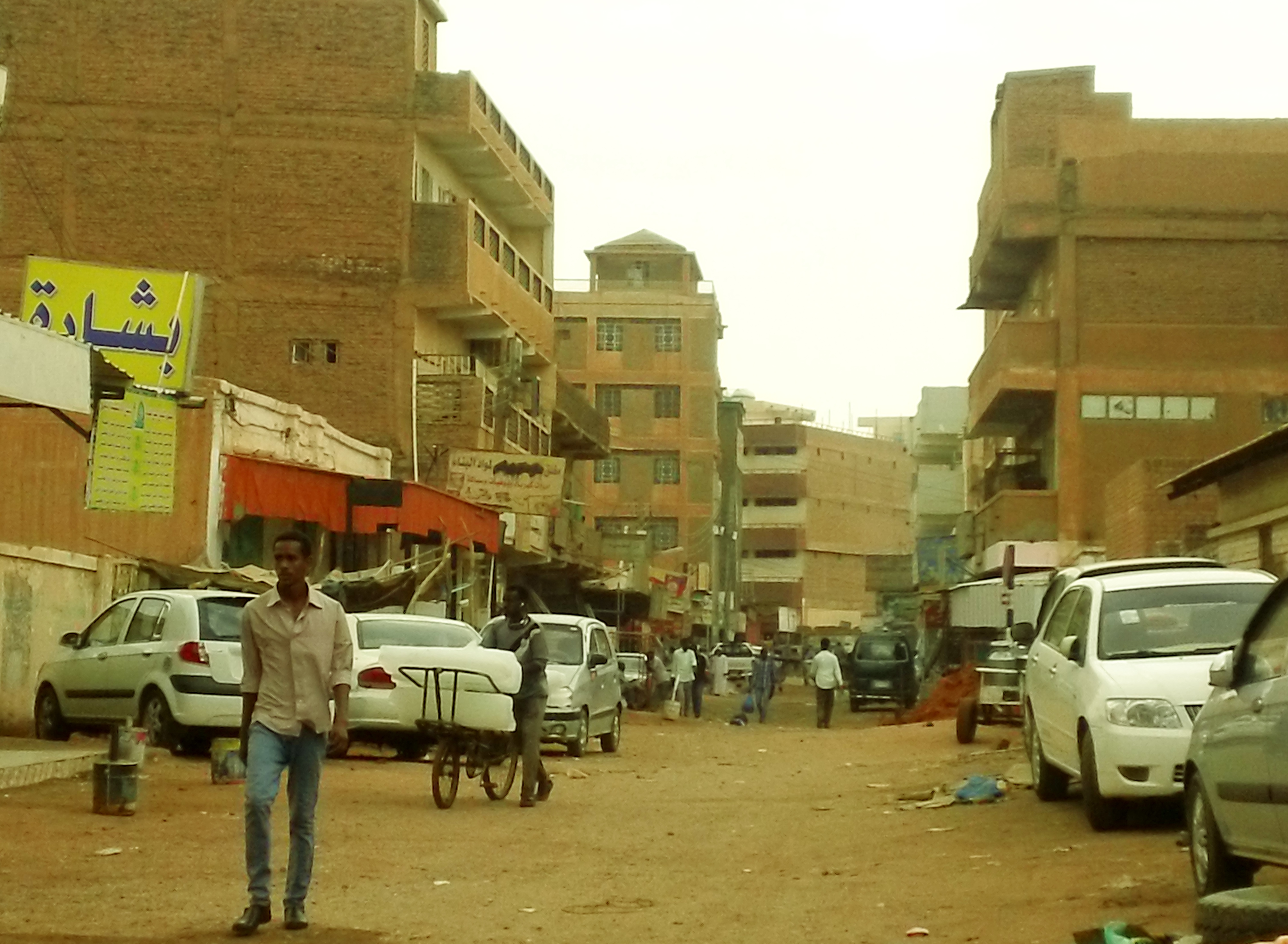 Omdurman market behind Omdurman ancient mosque Sudan